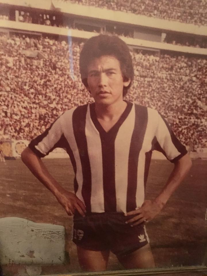 Rafael Xalapa Ortega con la camiseta de los Rayados de Monterrey